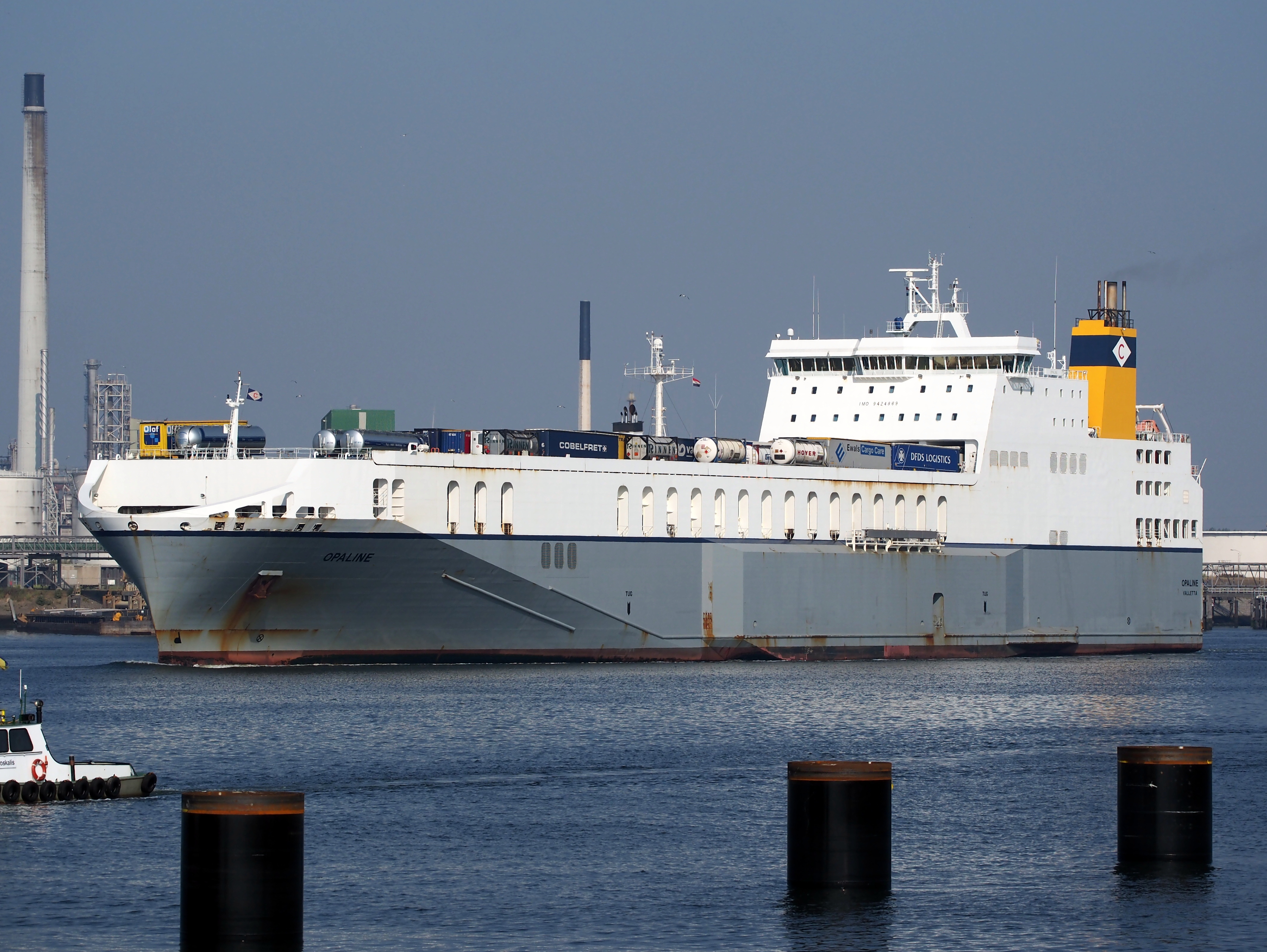 Opaline - IMO 9424869 - Callsign 9HA2478, Calandkanaal.